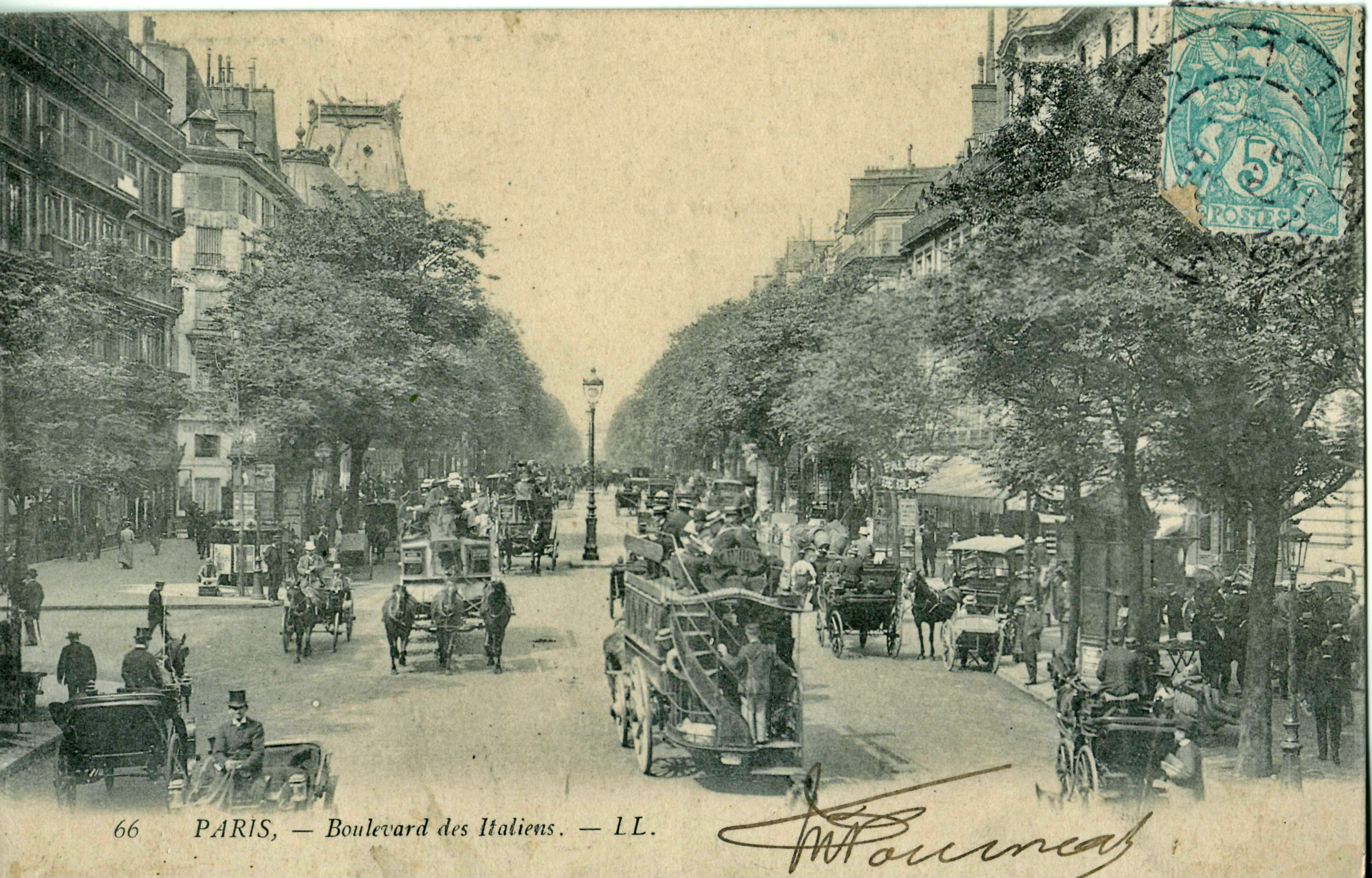 Carte postale ancienne éditée par LL, n°66 : PARIS - Boulevard des Italiens